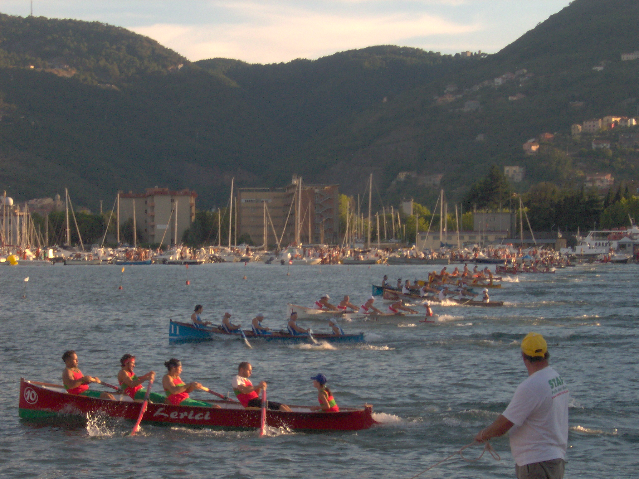 La Spezia - Partenza dell'81° palio (2006)